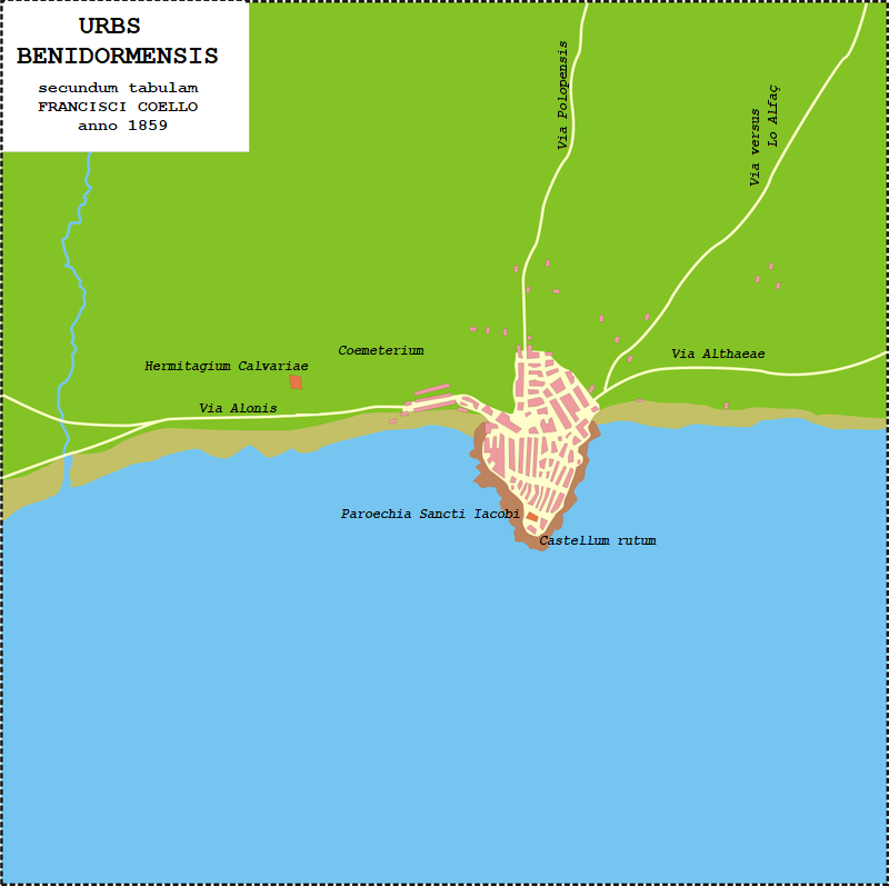 Urbs Benidormensis anno 1859